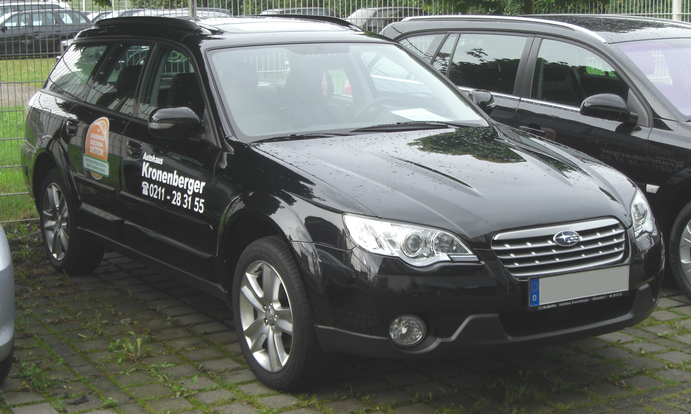 Subaru Legacy "Outback" Kombi